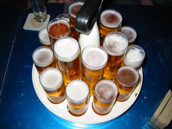 Ein Kranz Kölsch